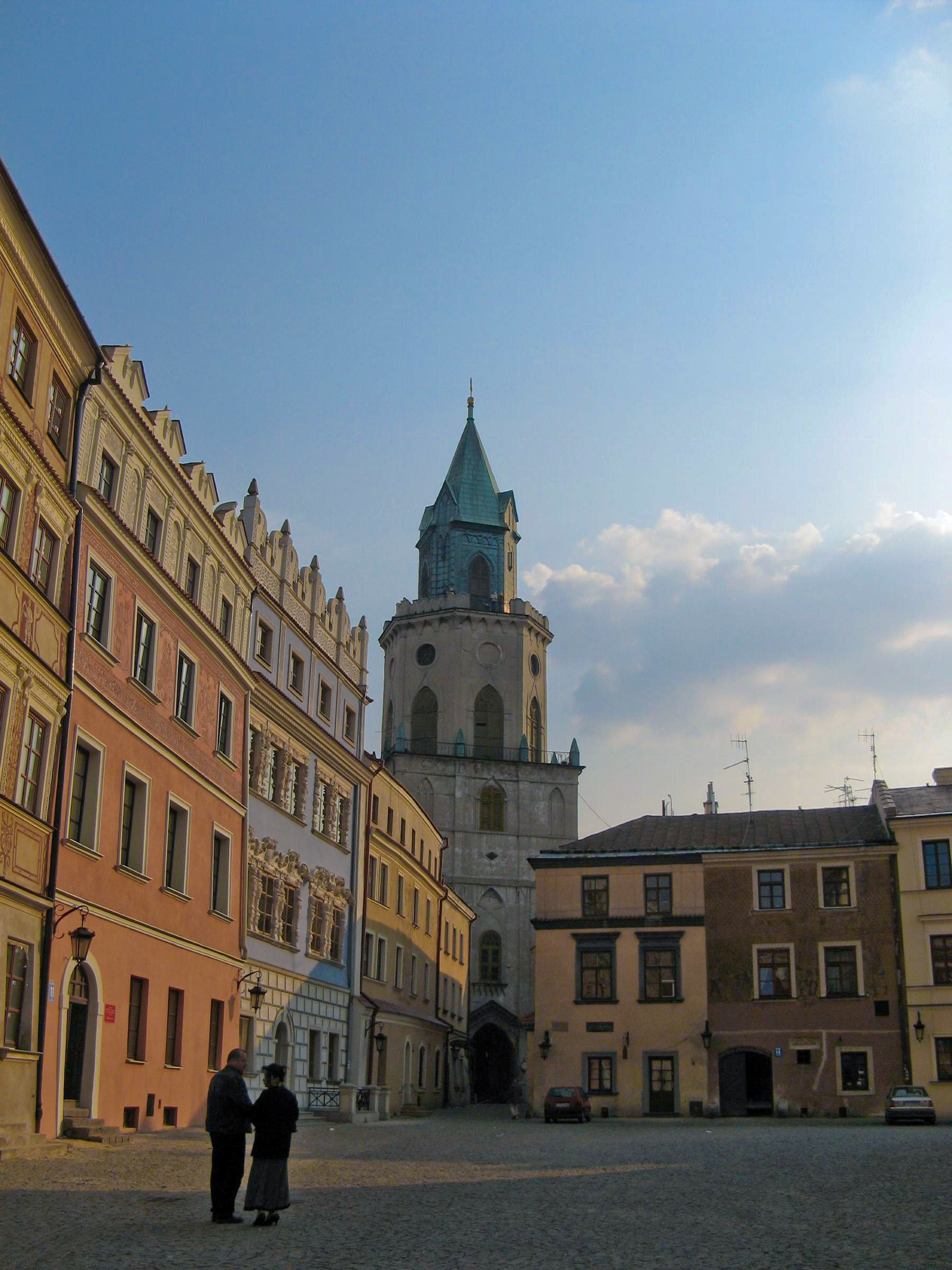 Wieża Trynitarska w Lublinie widziana z rynku Starego Miasta.